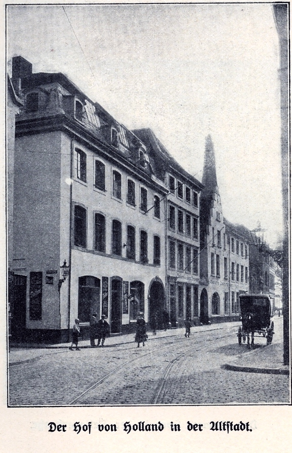 Der Hof von Holland an der Altestadt 17, Ecke Liefergasse (heute Nr. 1a) war im 18. Jahrhundert der „vornehmste Gasthof in Düsseldorf“.